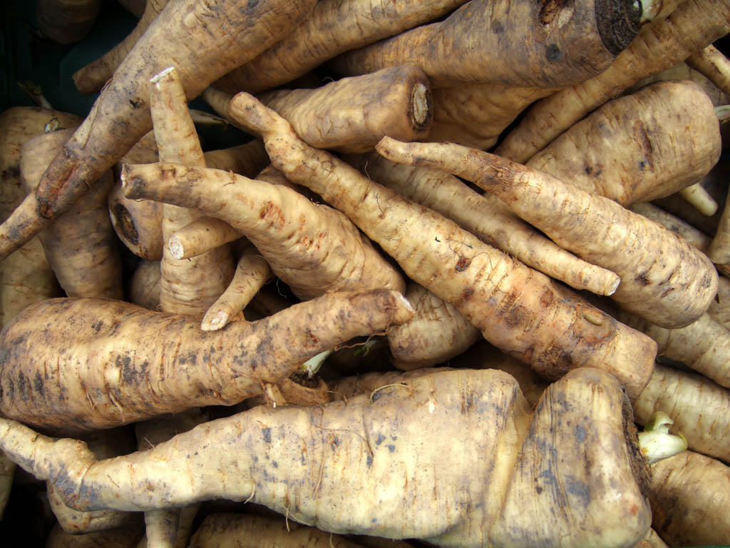 Pastinaken